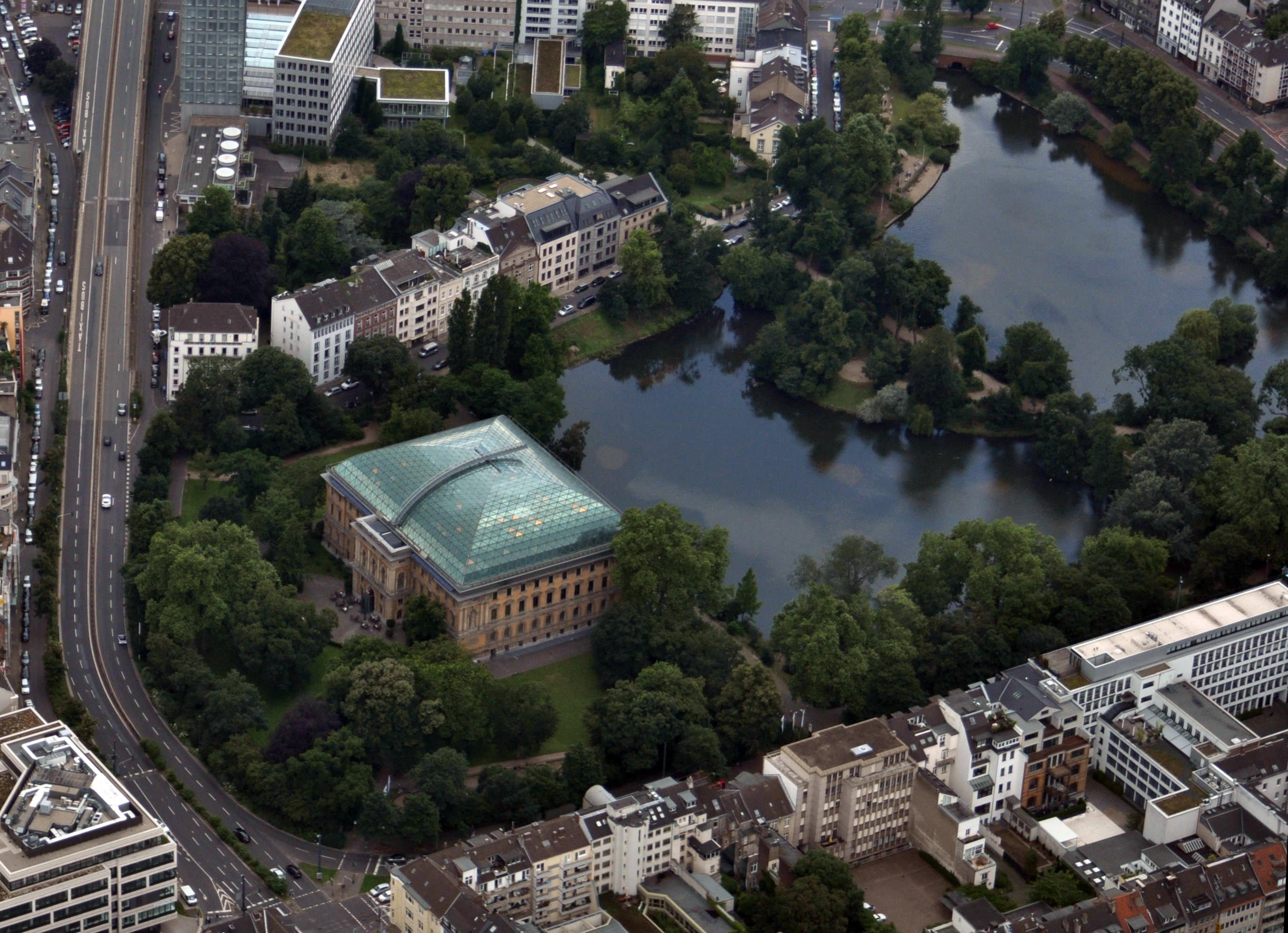 Ständehaus in Düsseldorf; Aufnahme von Osten, Luftbild aus ca. 600m Höhe über Grund